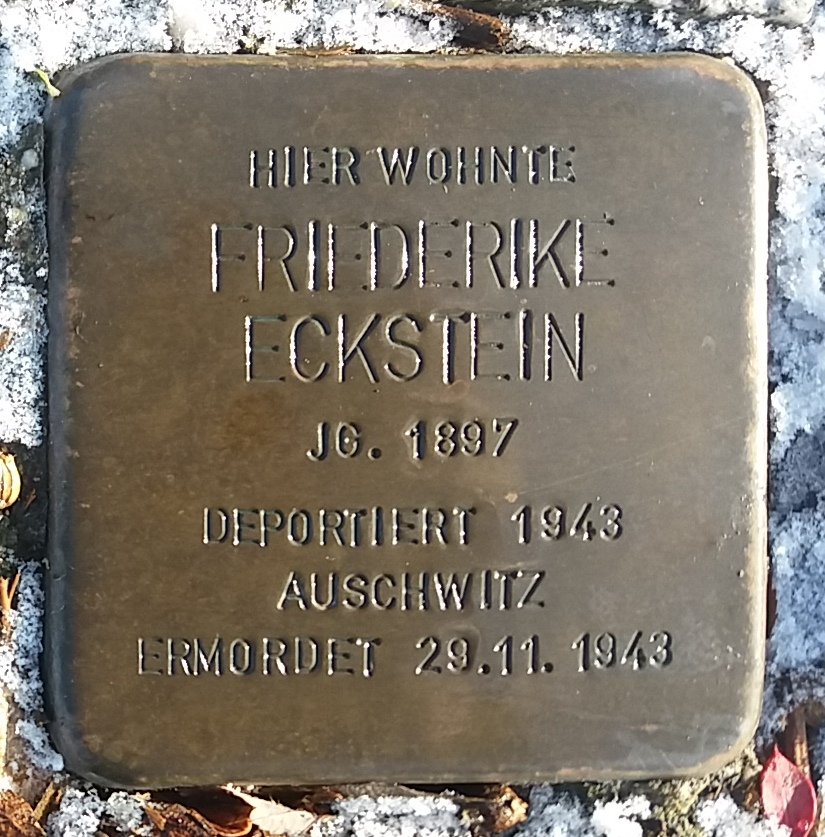 Stolperstein für Friederike Eckstein, Mitglied der Großfamilie Eckstein, Vöhringen (Iller)